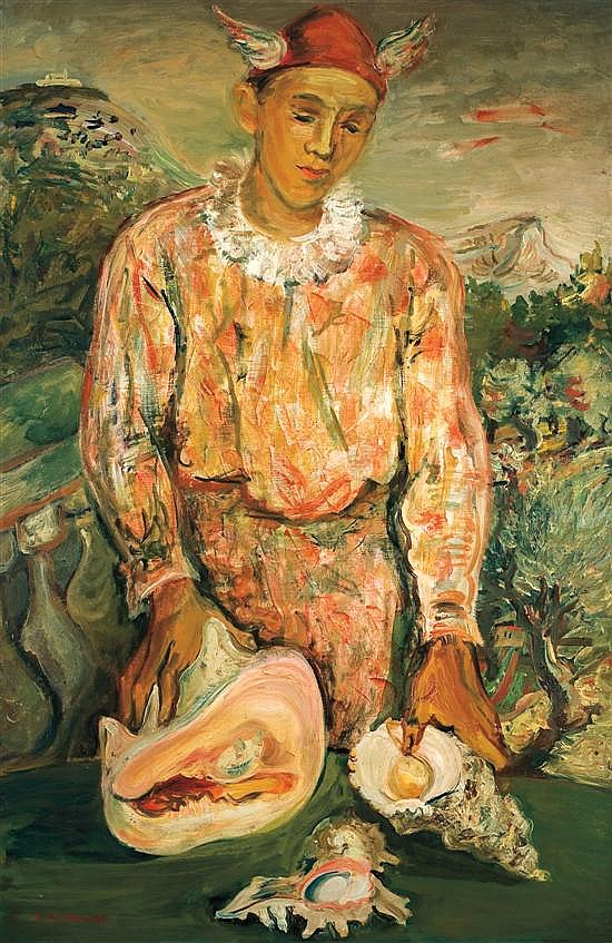 Pierrot